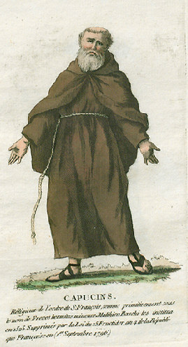 Collection de costumes de tous les ordres monastiques, supprimés à differentes époques, dans la ci-devant Belgique, Bruxelles, Philippe Joseph Maillart et sœur, 1811